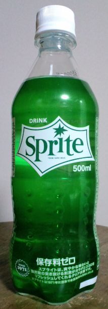 スプライトはコカコラが販売している炭酸飲料です。